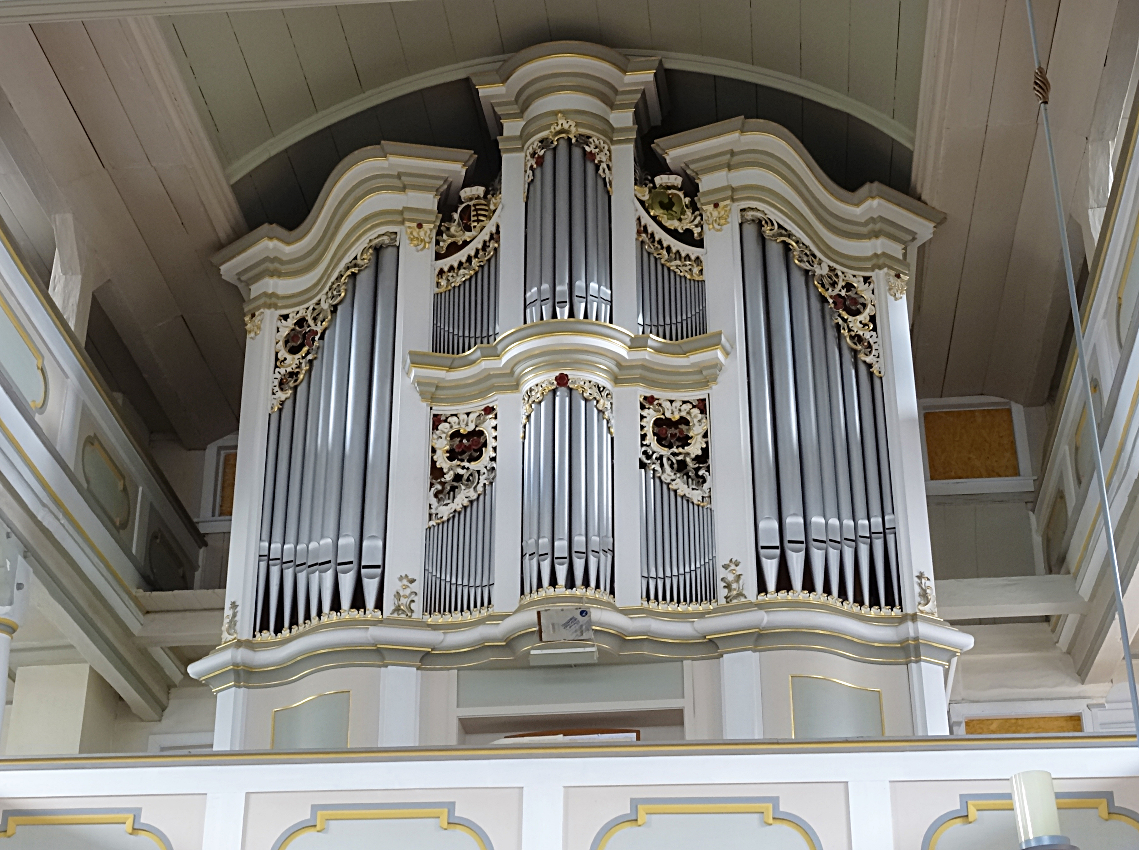 Schuster-Orgel (1960) der Erlöserkirche (Schmiedefeld) im historischen Gehäuse der Gebrüder Wagner (1770), II/P 22 [1]